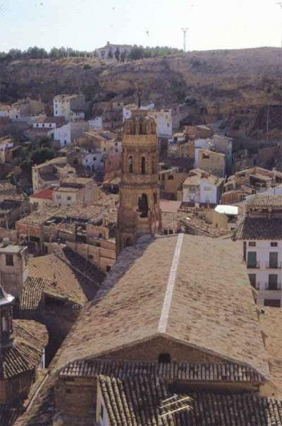 Iglesia de la Asunción de Albalate del Arzobispo antes de su restauración.